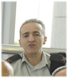 January 10, 2011 Today, the IDF Chief of Staff, Lt. Gen. Gabi Ashkenazi, as well as members of the General Staff, parted with the outgoing Director of the Mossad Intelligence Agency, Maj. Gen (res.) Meir Dagan in a celebratory lunch at the Rabin base in Tel Aviv. The Chief of Staff thanked the outgoing Mossad Director for his combined effort and said, "During the past eight years, as head of the Mossad, you were on the forefront of achievement. You led the agency during a unique and challenging period and contributed exceptionally, with most of your achievements unknown. Over the eight years we've worked together collaboratively and with the mutual understanding that we are working towards a shared and higher goal--the security of the State of Israel." The outgoing Director thanked the Chief of Staff for the years of cooperation and wished him and the General Staff luck in the rest of their endeavors. Pictured: The General Staff with Maj. Gen. (res.) Meir Dagan Photography: Cpl. Ori Shifrin, IDF Spokesperson's Unit * הרמטכ"ל, רא"ל אשכנזי, וחברי פורום המטה הכללי נפרדו היום (ב') מראש המוסד היוצא, אלוף (במיל') מאיר דגן, בארוחת צהריים חגיגית בבסיס רבין בת"א. הרמטכ"ל הודה לראש המוסד היוצא על העבודה המשותפת ואמר כי "בשמונה השנים האחרונות, כראש המוסד, היית בחזית העשייה, הובלת את הארגון בתקופה מיוחדת ומאתגרת ותרמת תרומה ייחודית שרובה לא ידועה. בשנים האחרונות עבדנו יחד בשיתוף פעולה ומתוך הבנה שאנחנו משרתים מטרה משותפת ועליונה- ביטחונה של מדינת ישראל". ראש המוסד היוצא הודה לרמטכ"ל על שיתוף הפעולה ואיחל לו ולחברי פורום מטכ"ל הצלחה בהמשך העשייה החשובה. בתמונה: פורום מטכ"ל והאלוף (מיל') דגן. צילום: רב"ט אורי שיפרין, דובר צה"ל